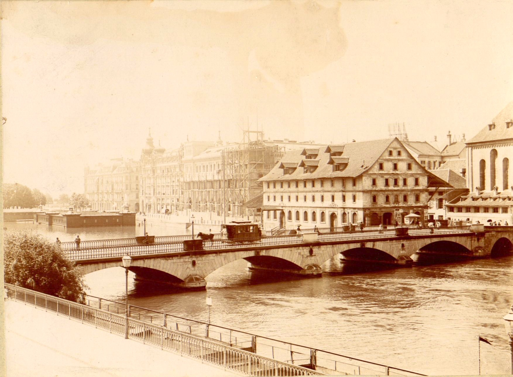 Münsterbrücke mit Rösslitram. Hinter dem Kaufhaus die fast vollendete neue Fraumünsterpost (ca. 1896).